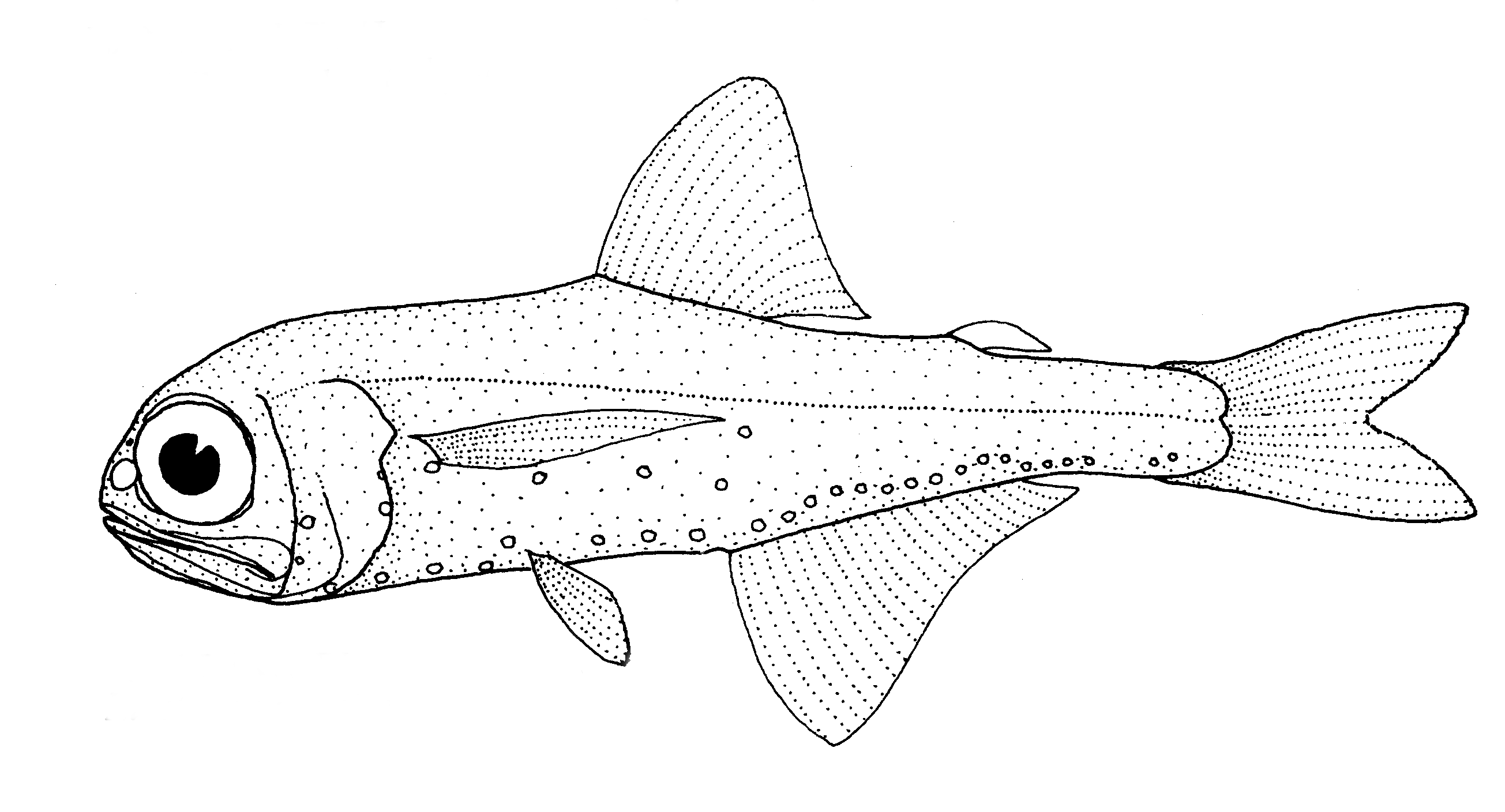 Electrona paucirastra (no common name)